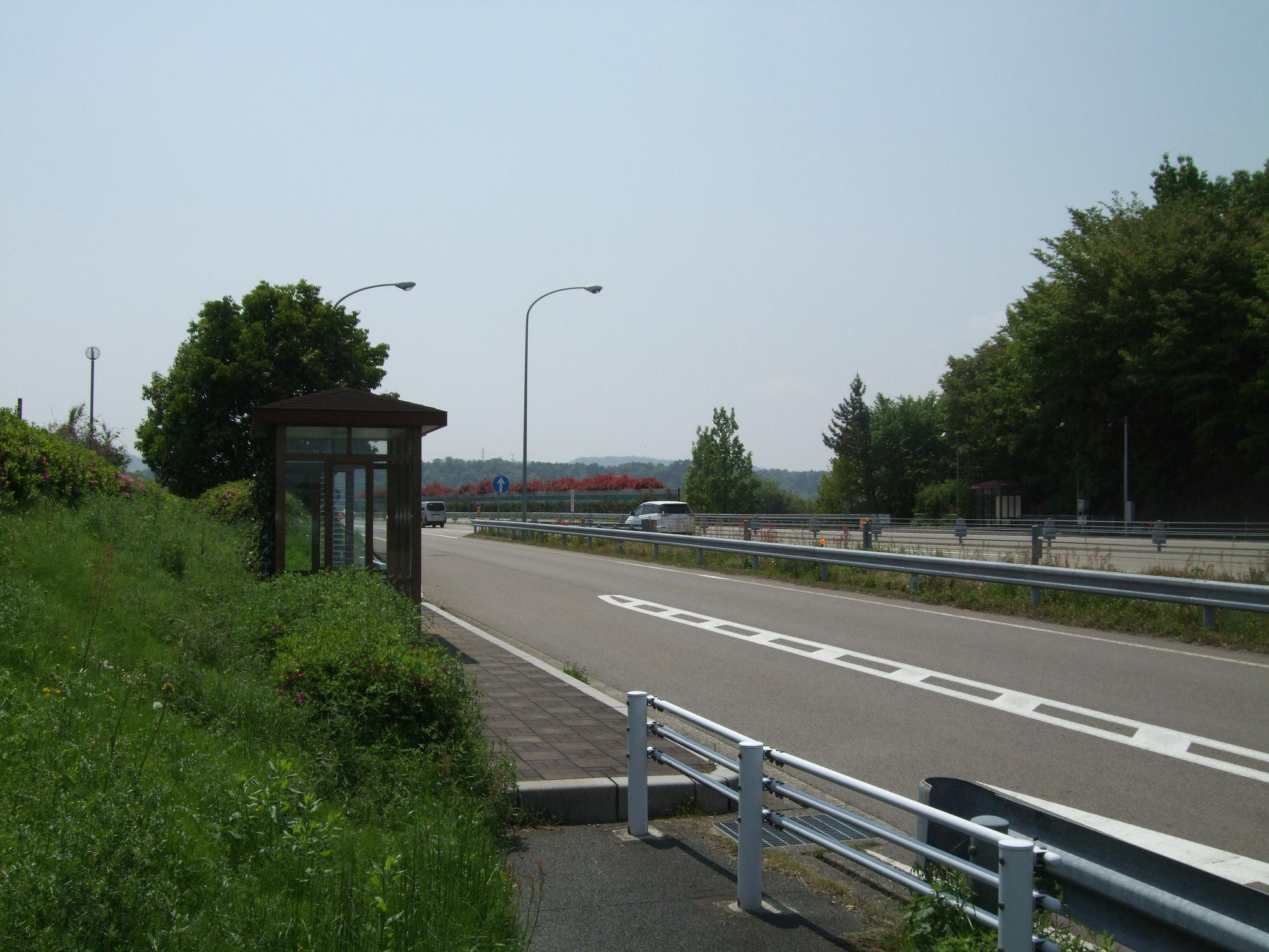 東海北陸自動車道 小瀬バスストップ（関サービスエリアから撮影） 2008.4.27 投稿者が撮影